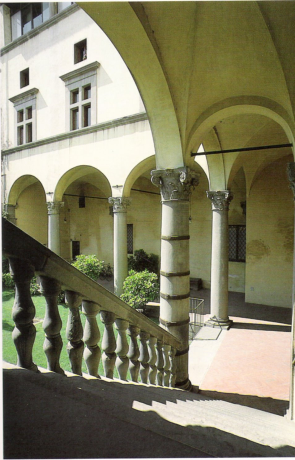 old magazine scanner - Cortile pubblico Palazzo del Balì